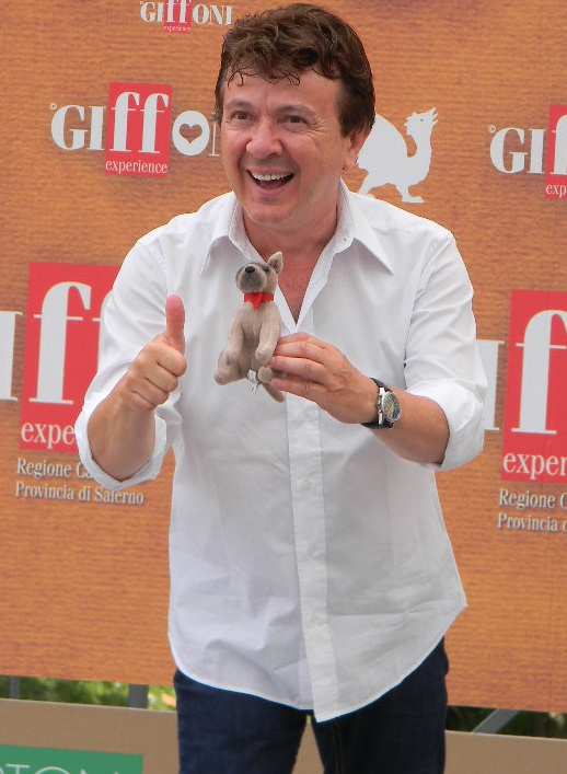 Pupo al Giffoni Film Festival 2010